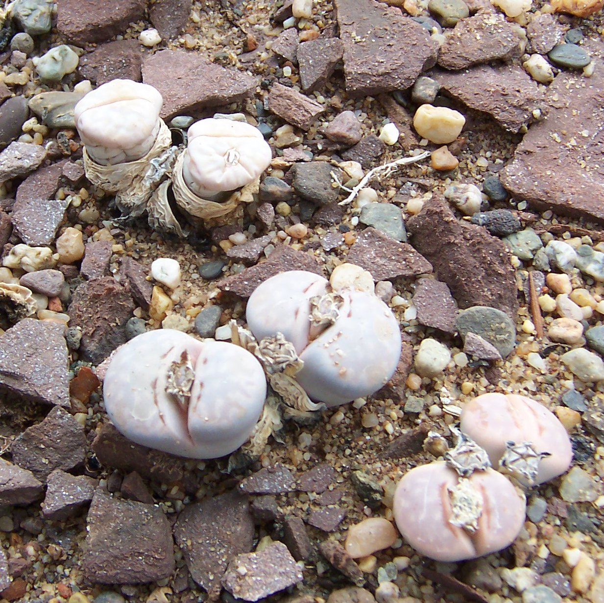 Lithops julii, Nicos Farm strain